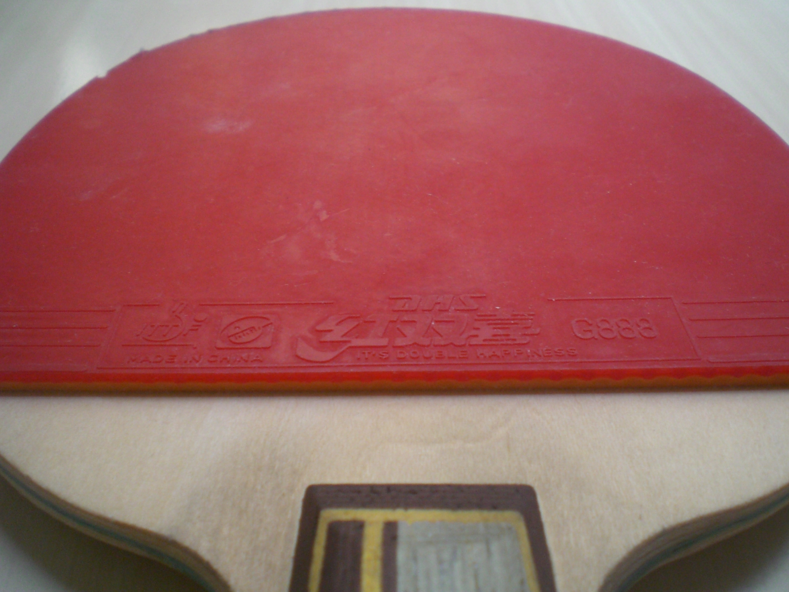 紅雙喜牌子桌球拍, 中國製造中國馳名商標